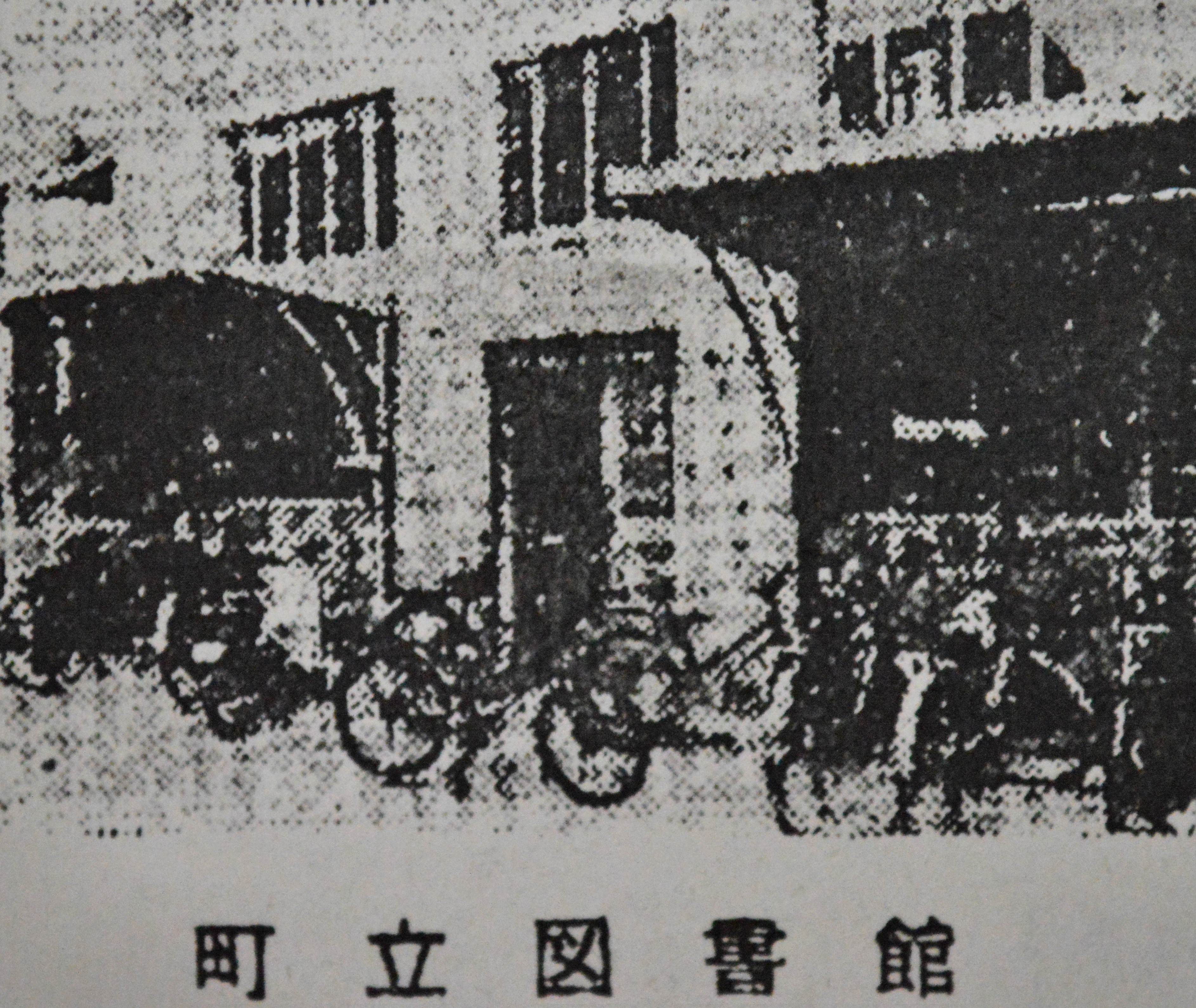 愛知県海部郡蟹江町。1966年の蟹江町立図書館（初代）。